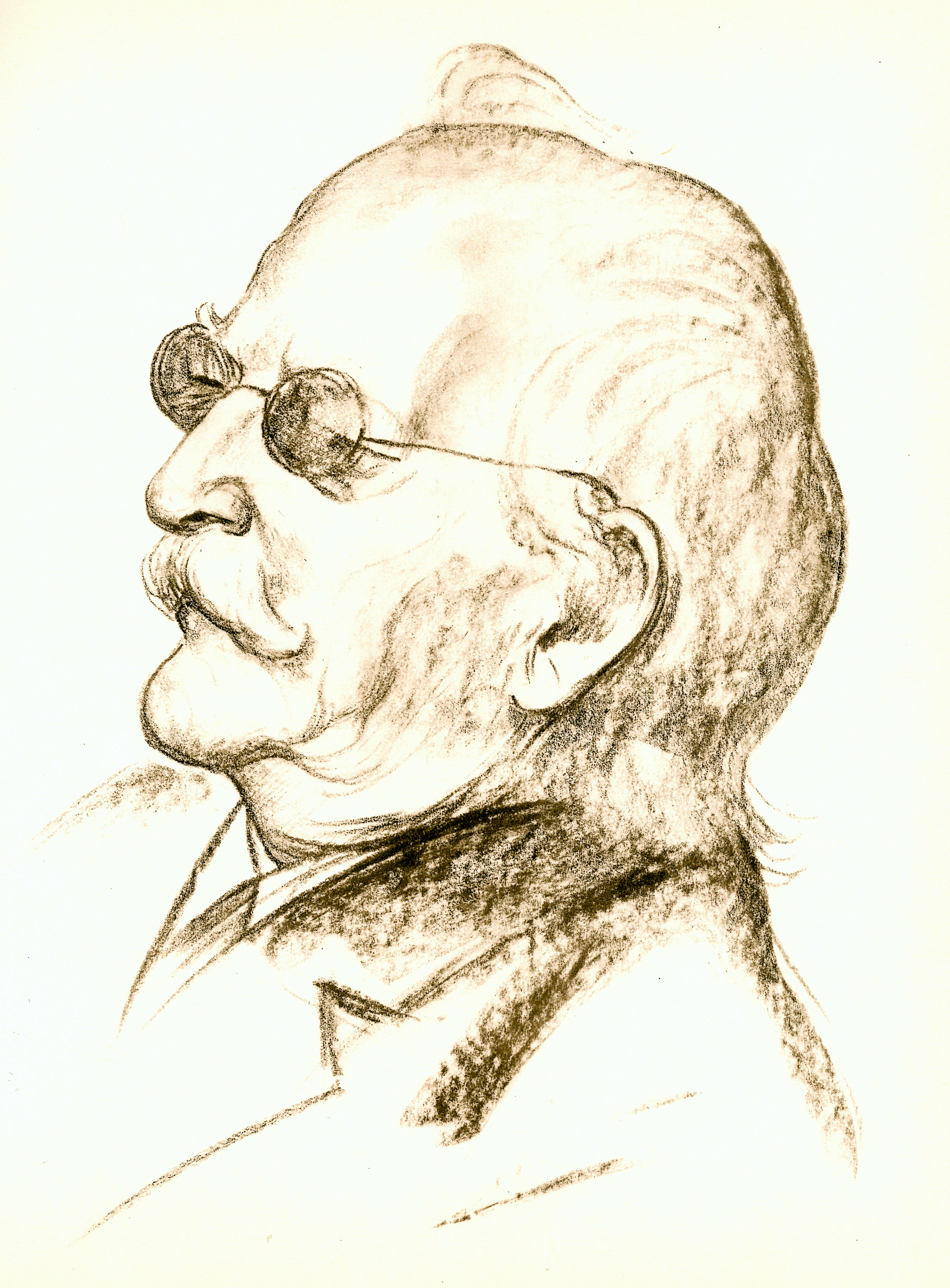 Porträt des deutschen Gymnasiallehrers, Schriftstellers, Philologen und Romanisten Adolf Ey (1844-1934), dessen Romane und Erzählungen oftmals in seiner Heimat im Harz spielten; Scan aus dem Band 1 des Buches „Hannoversche Köpfe aus Verwaltung, Wirtschaft, Kunst und Literatur“ mit Zeichnungen des Malers August Heitmüller in Kooperation mit dem Grafiker Wilhelm Metzig (Entwurf der Gesamtausstattung der beiden Bände), gedruckt und verlegt durch die Buchdruckerei Heinrich Osterwald (Buch- und Kupfertiefdruck sowie Buchbindearbeit)